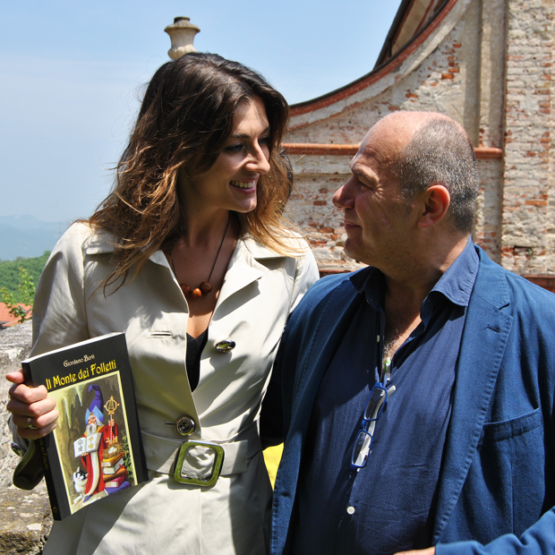 Elisa Isoardi con lo scrittore Giordano Berti